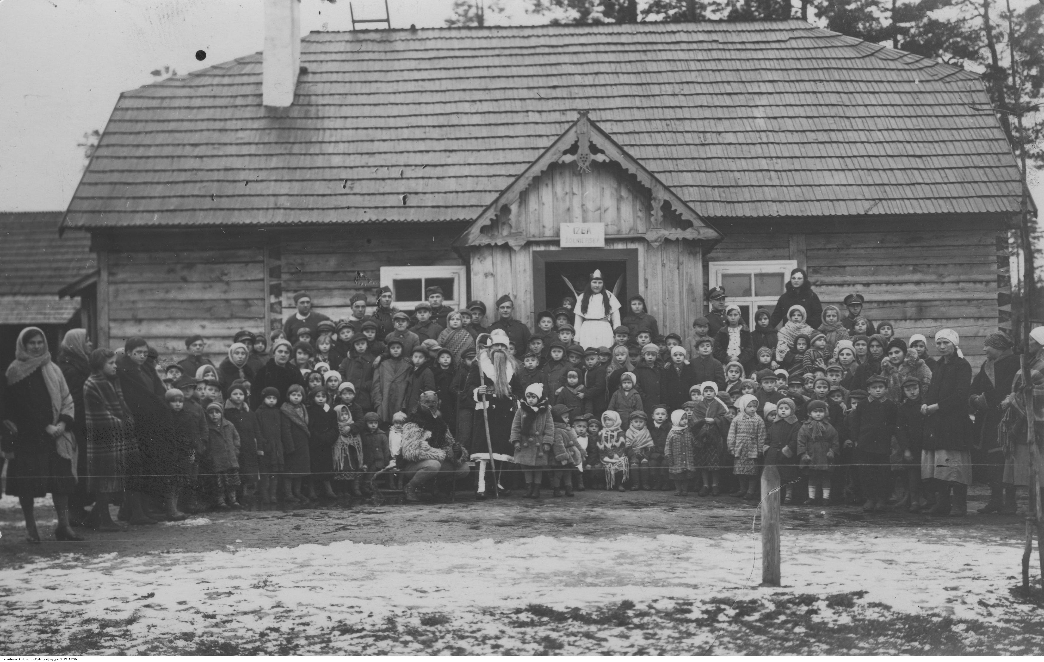 Świetlica Korpusu Ochrony Pogranicza w Kaletach. Fotografia grupowa żołnierzy KOP-u i miejscowej ludności na tle nowej izby żołnierskiej. Koncern Ilustrowany Kurier Codzienny - Archiwum Ilustracji. Sygnatura: 1-W-1796